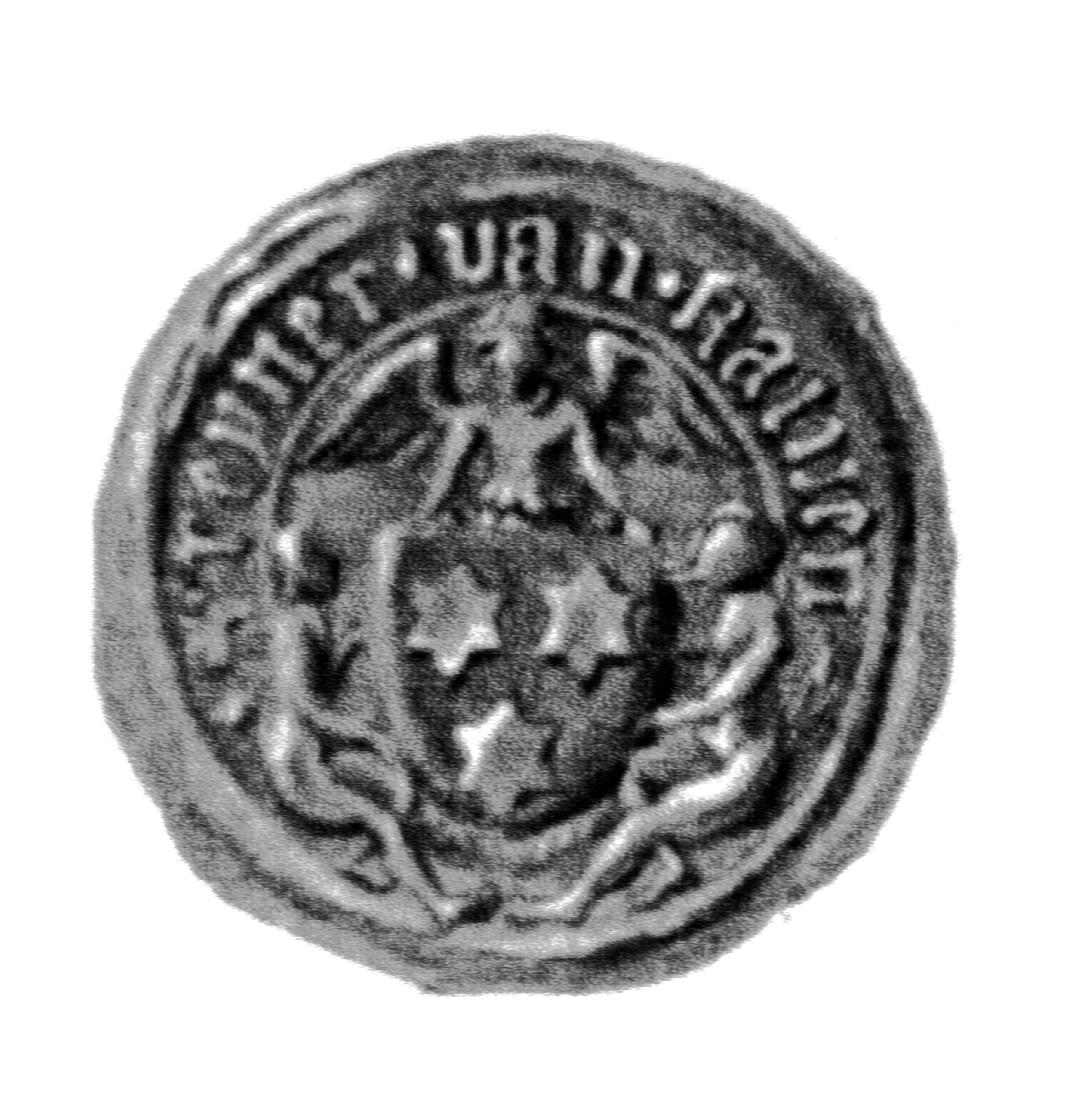 Siegel des Ratsmannes Reyner von Calven. Das Siegel stammt aus der Zeit um 1408. Siehe Emil Ferdinand Fehling: Lübeckische Ratslinie, Nr. 432 (Reyner von Calven).